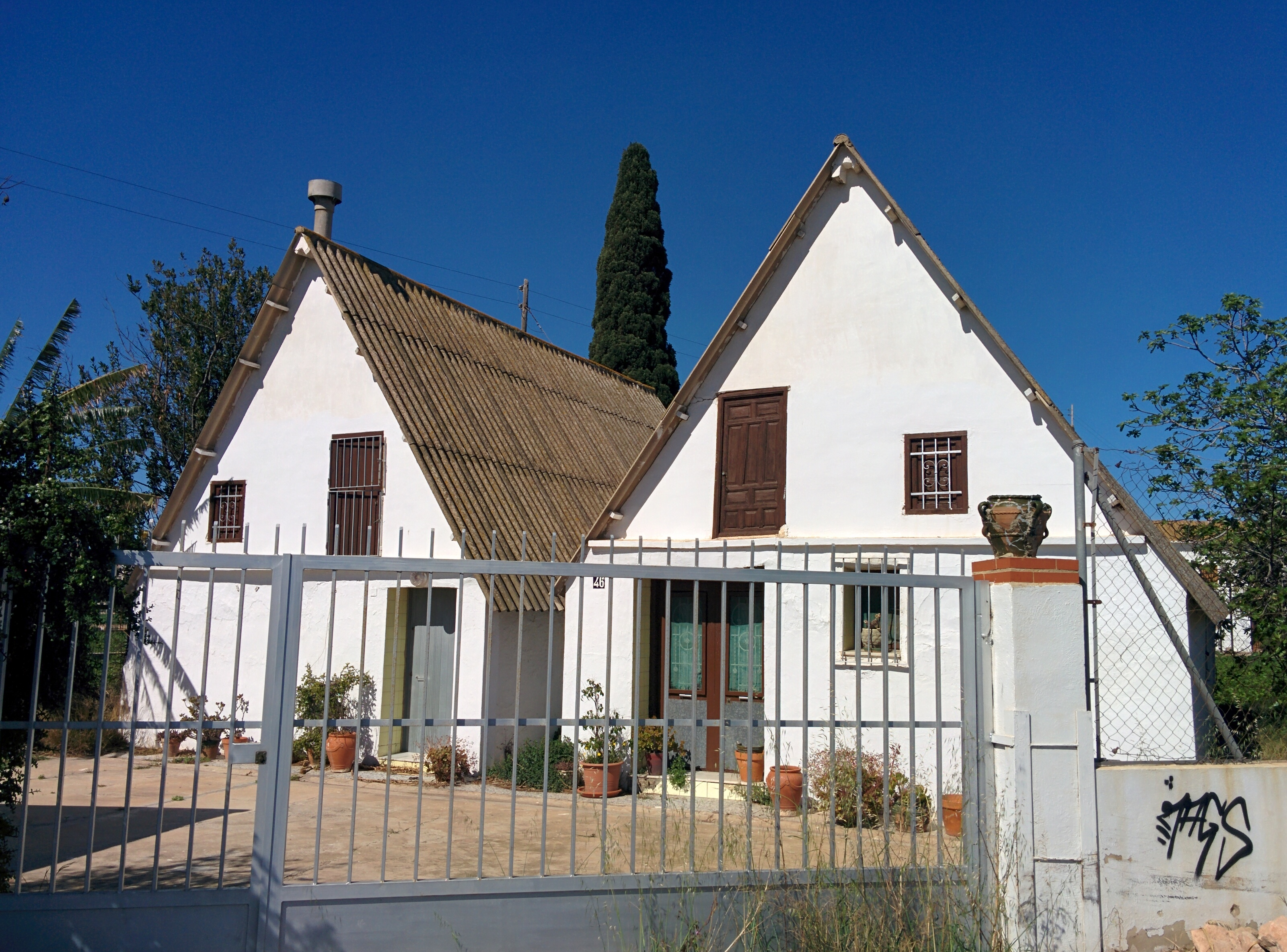 Barranques de Panach, en Camí de Vera (Valencia, España).